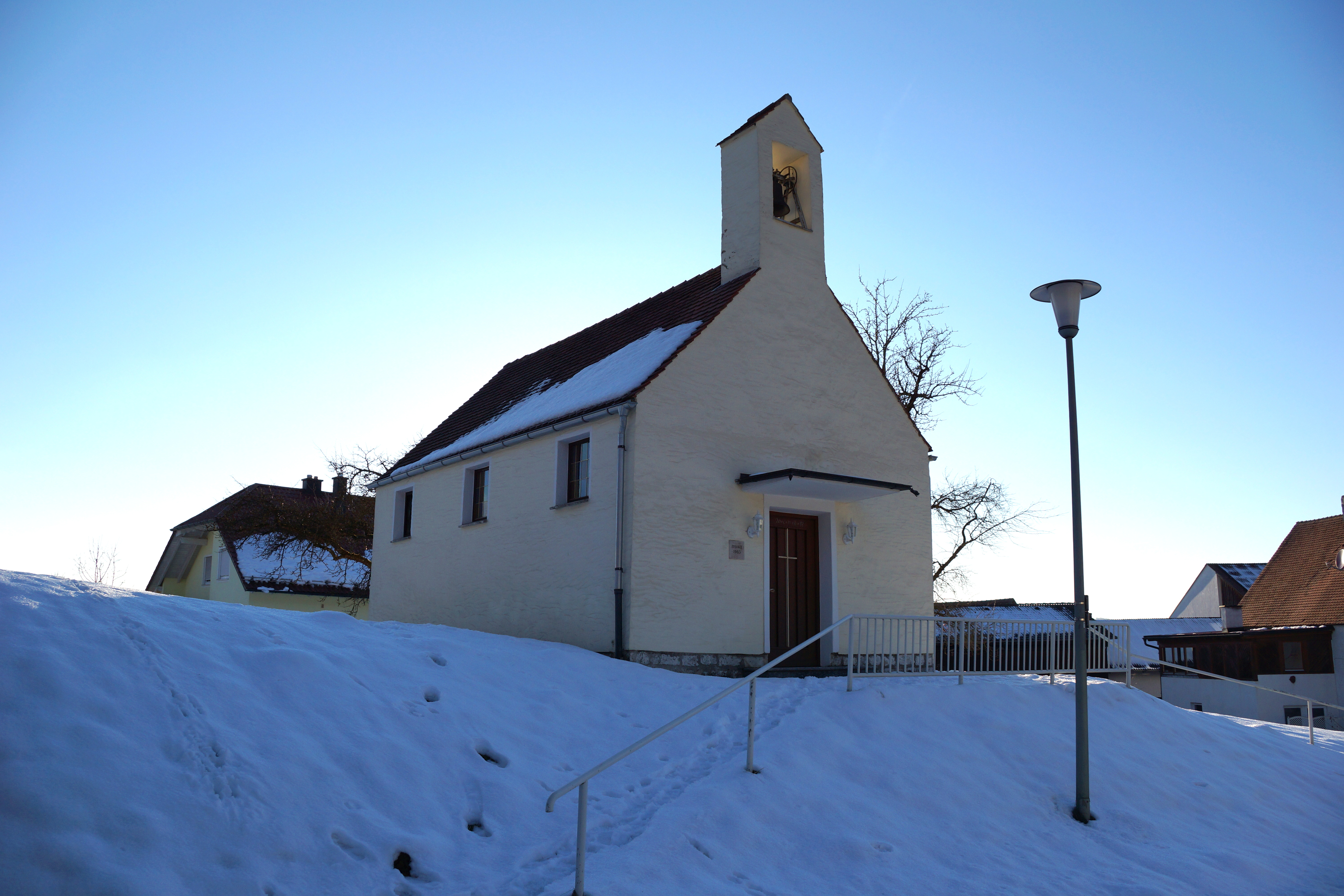 Die Ortskapelle in dem Oberpfälzer Ort Kadenzhofen bei Neumarkt